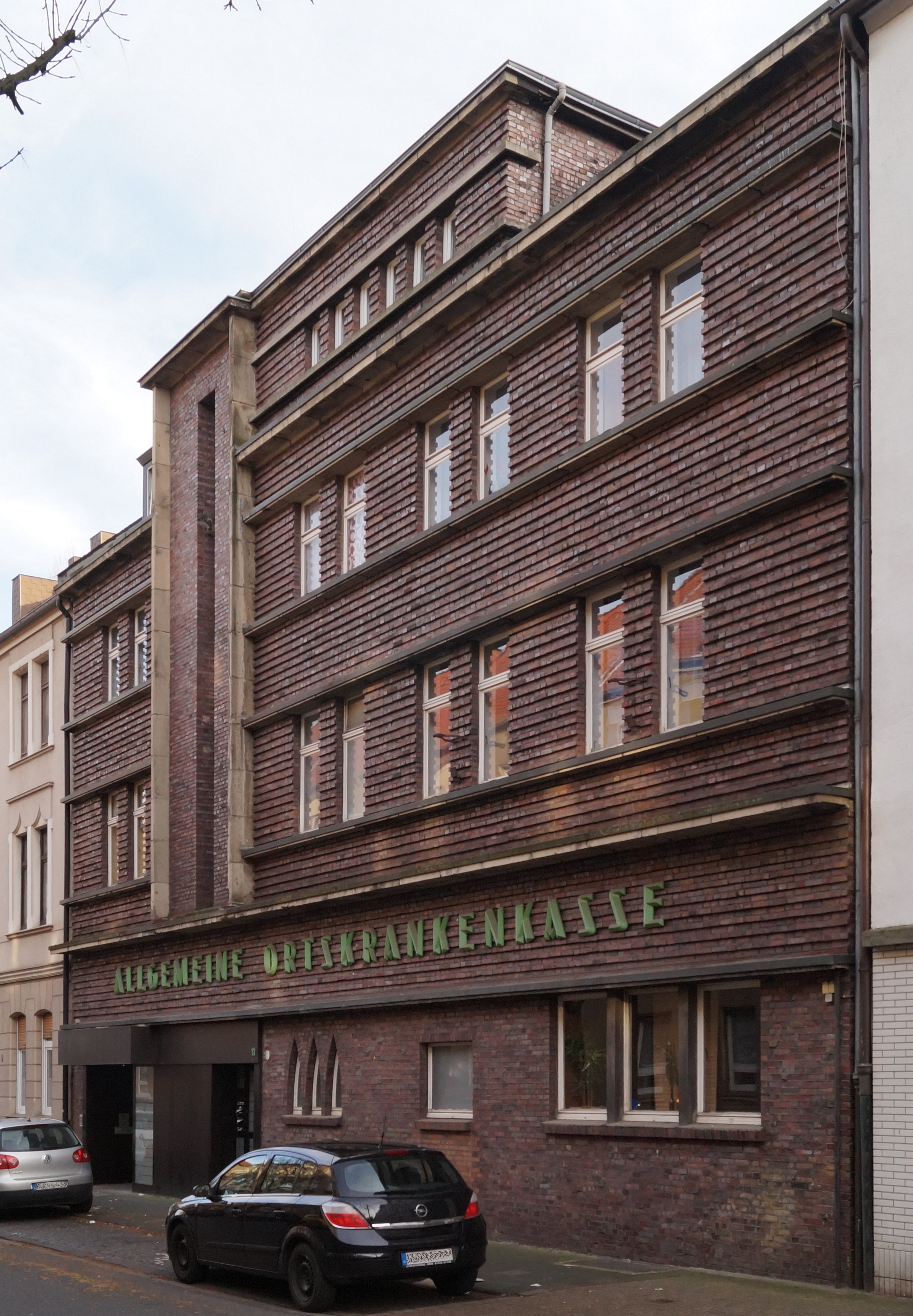 Herne-Wanne Märkische Straße 11, Front